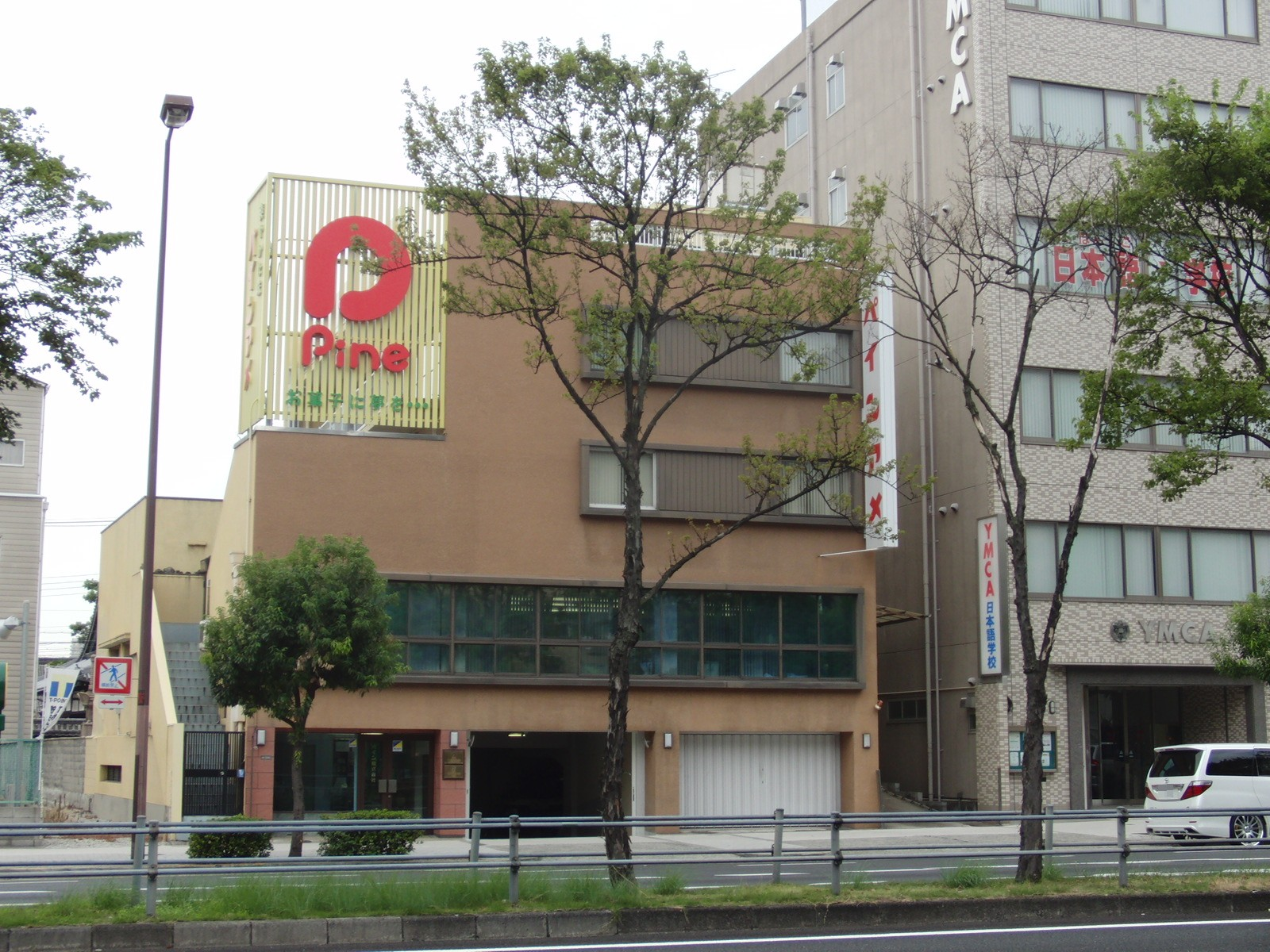 パイン本社を撮影